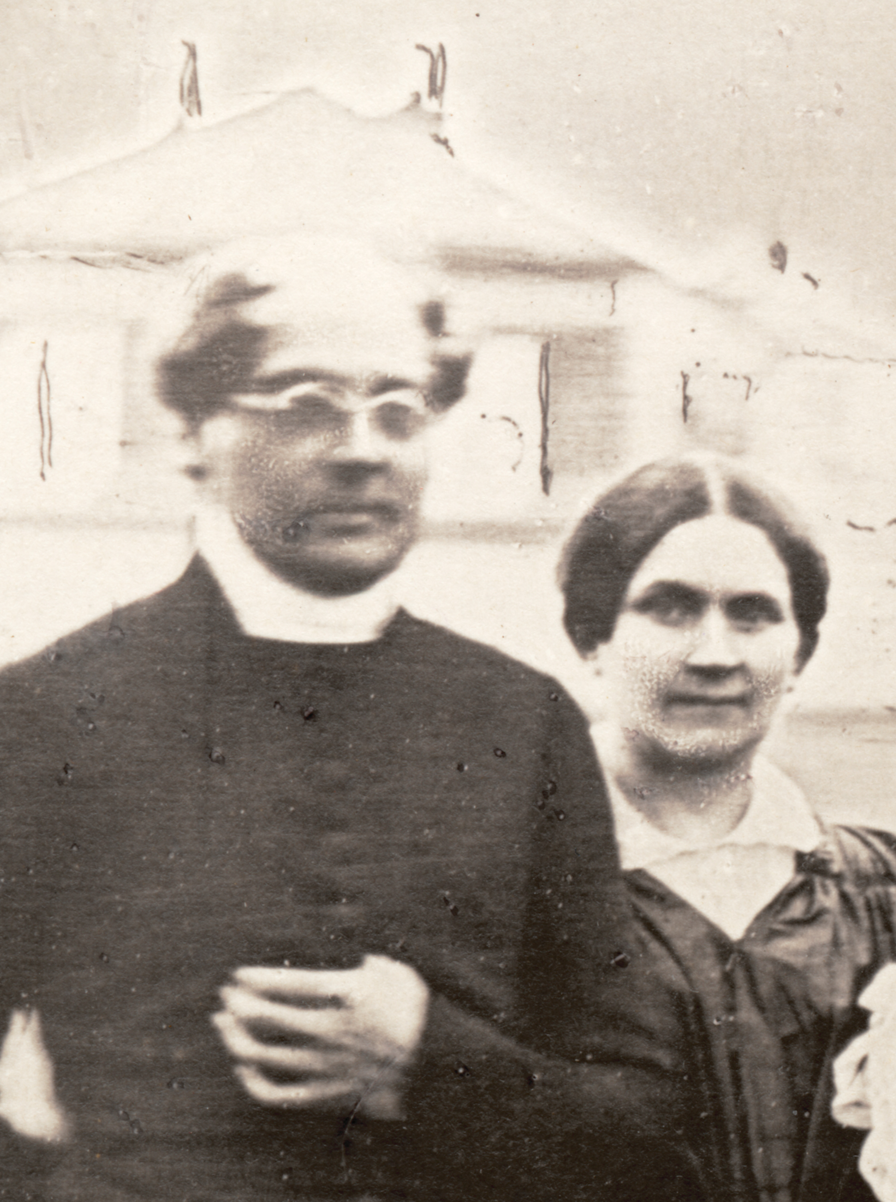 J.L. Runeberg, Fredrika Runeberg. Detalj av kopia av dagerrotypin 1846 av Joseph Desarnod. Signum: slsa1160_364_del Svenska litteratursällskapet i Finland